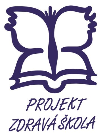 Logo projektu Zdravá škola v České republice. Lze jej nalézt na mnoho webových stránkách.